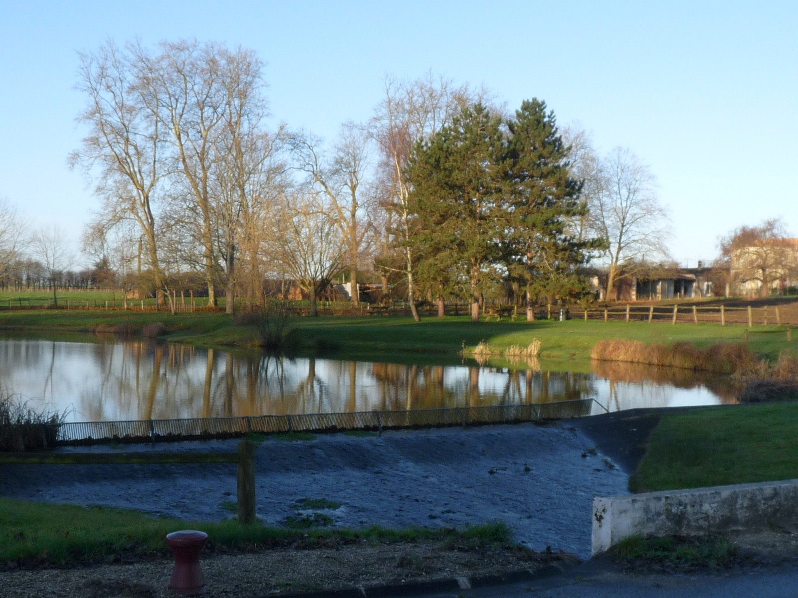 Etang, Vallet, Charente-Maritime, France